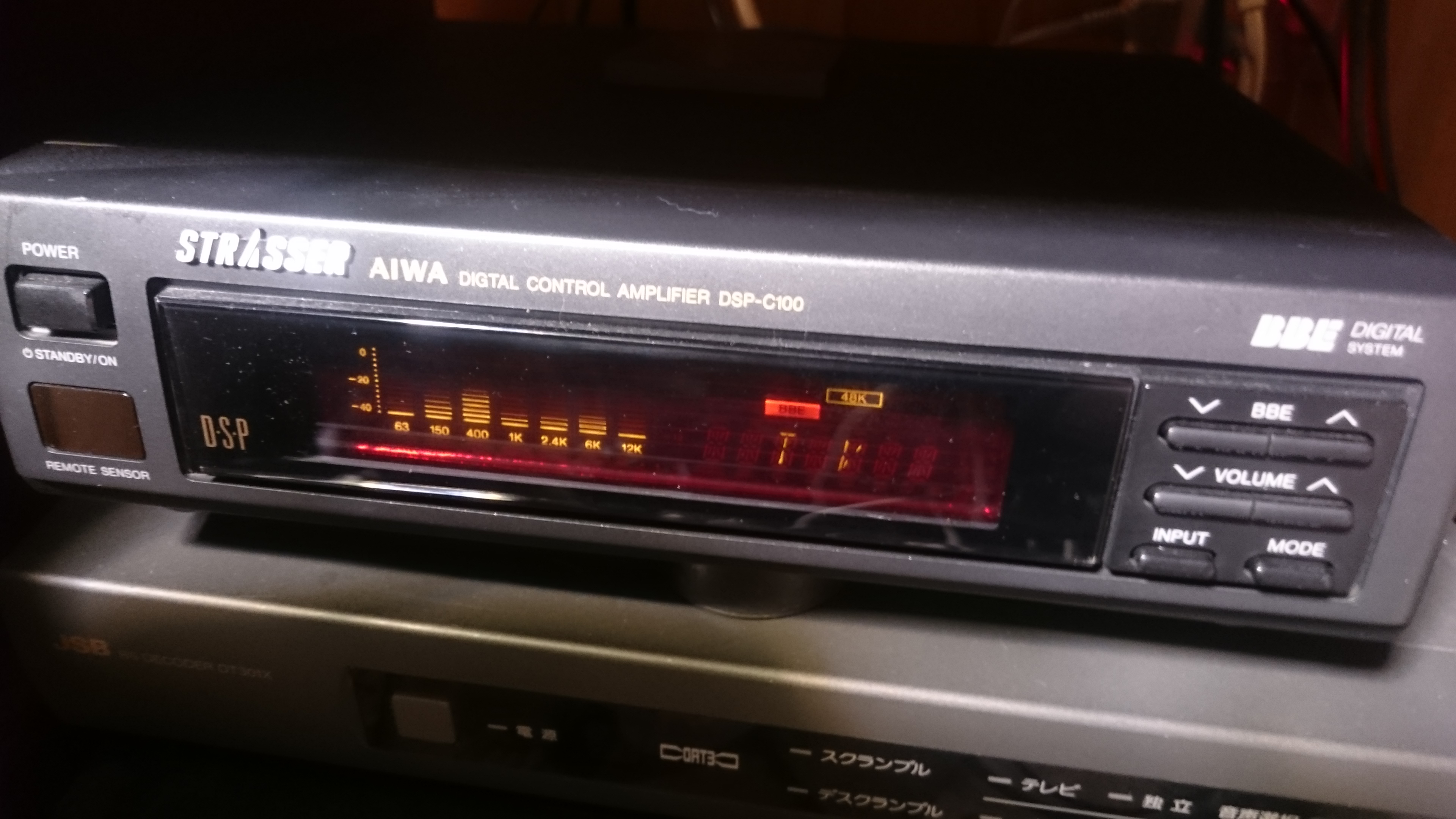 アイワ製デジタルコントロールアンプDSP-C100